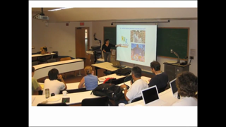 Trabajo en cambio